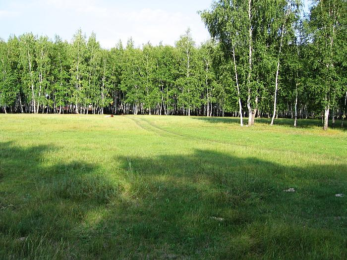 Iwanowerwald